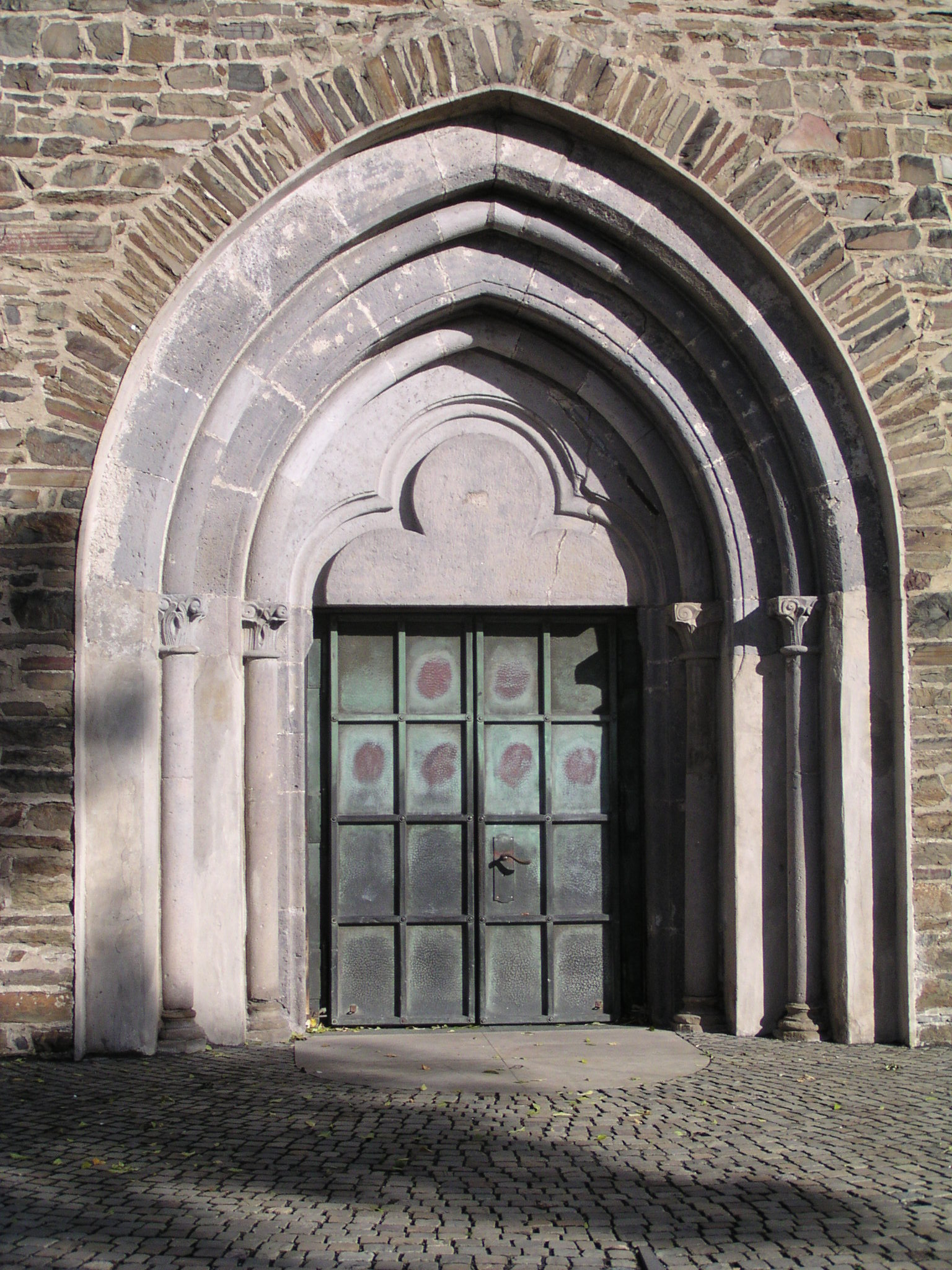 Hauptportal der evangelischen Martinikirche in Siegen in Westfalen.